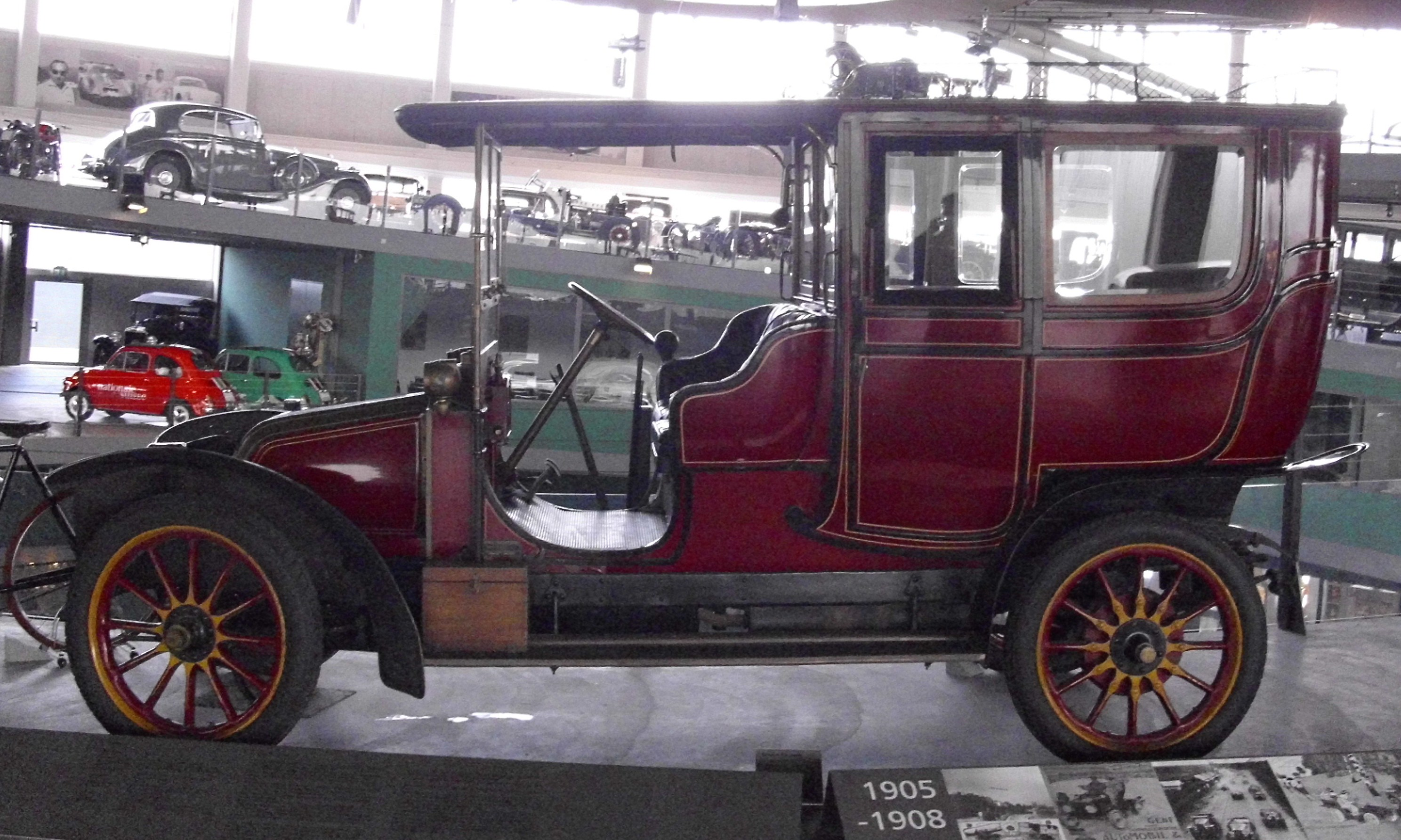 Renault Type AZ Limousine 1908